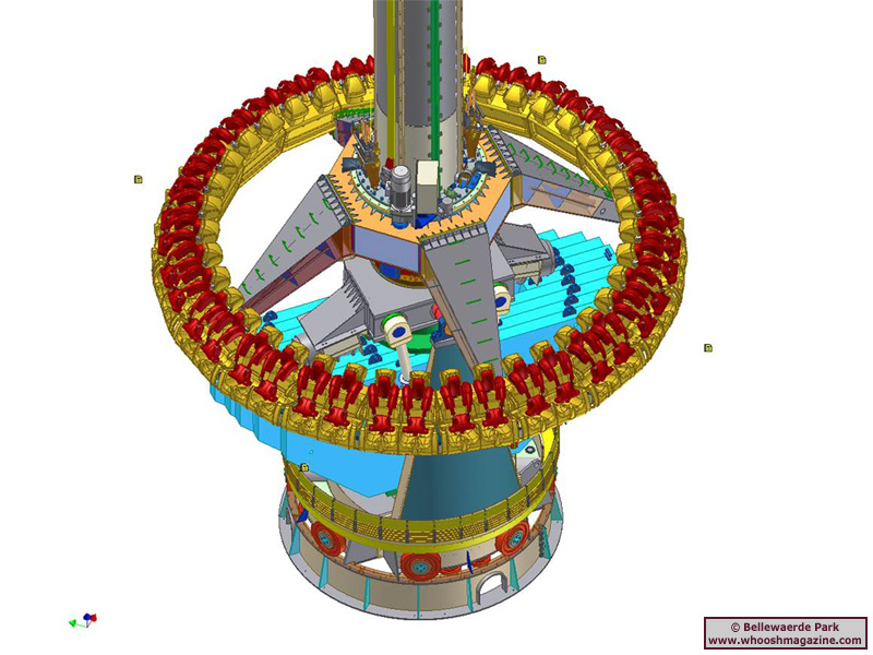 Topple Tower Attractie